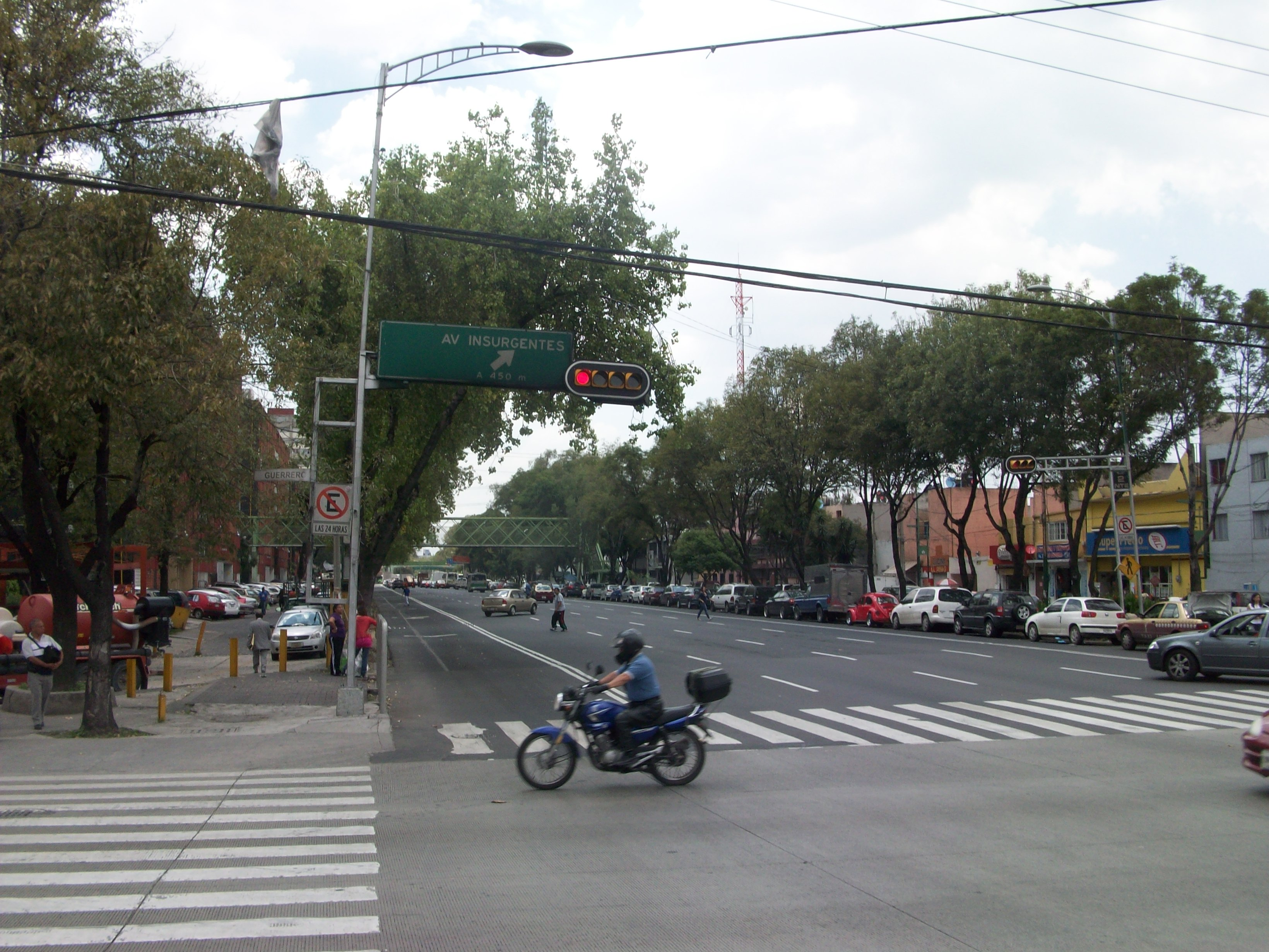 Avenida Manuel Gonzalez